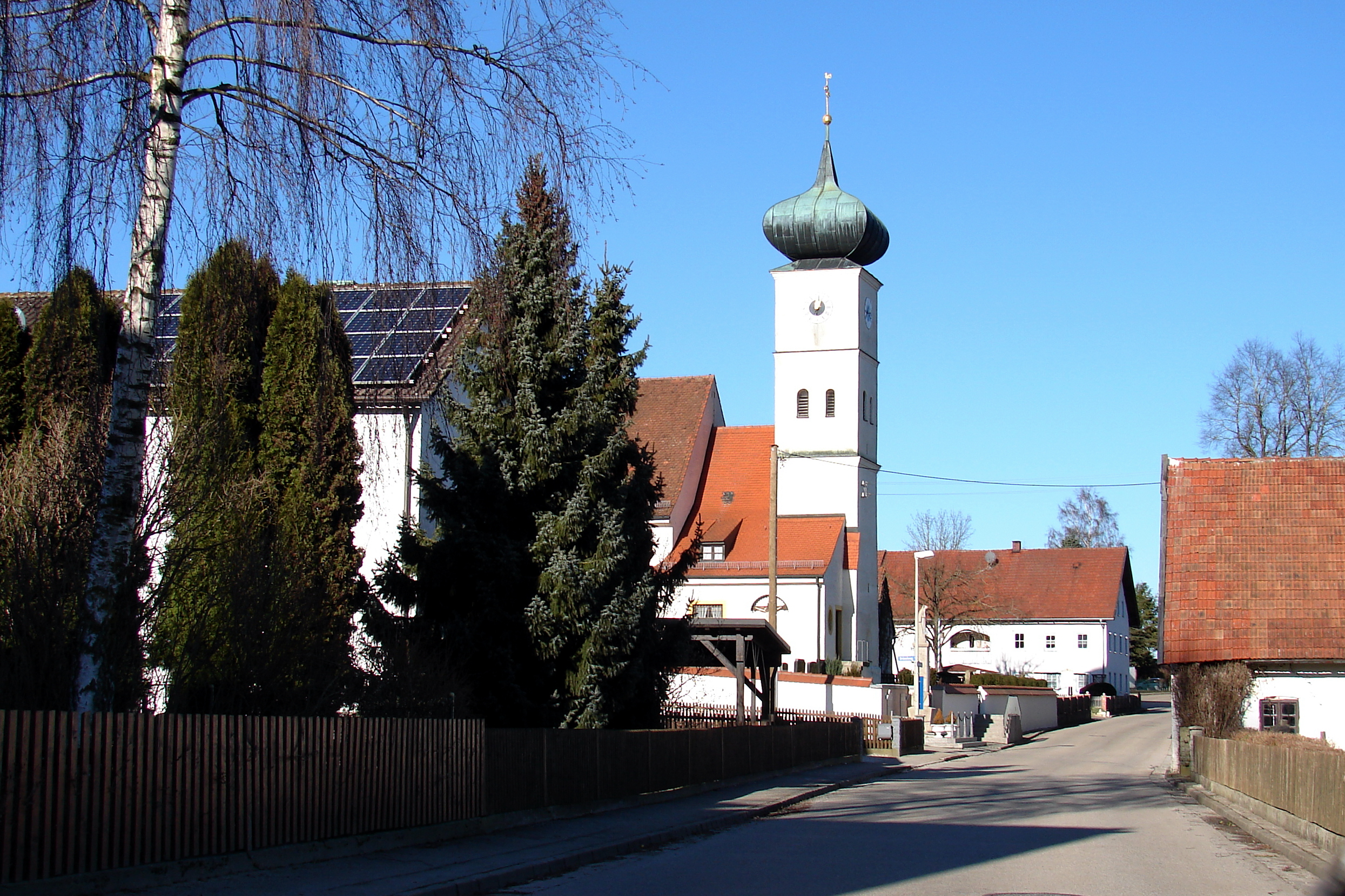 Kath. Pfarrkirche Herz Jesu in Baumgarten